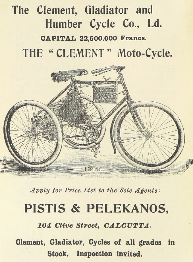 Advertisement for Clement "moto-cycle"